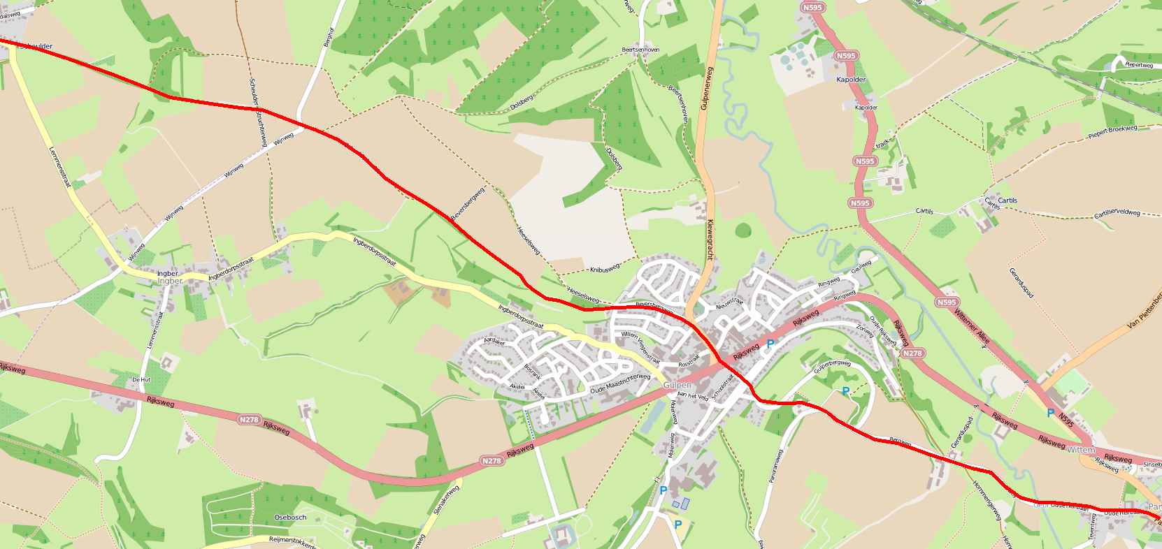 Reconstructie oude Akerweg, tussen Maastricht en Aken